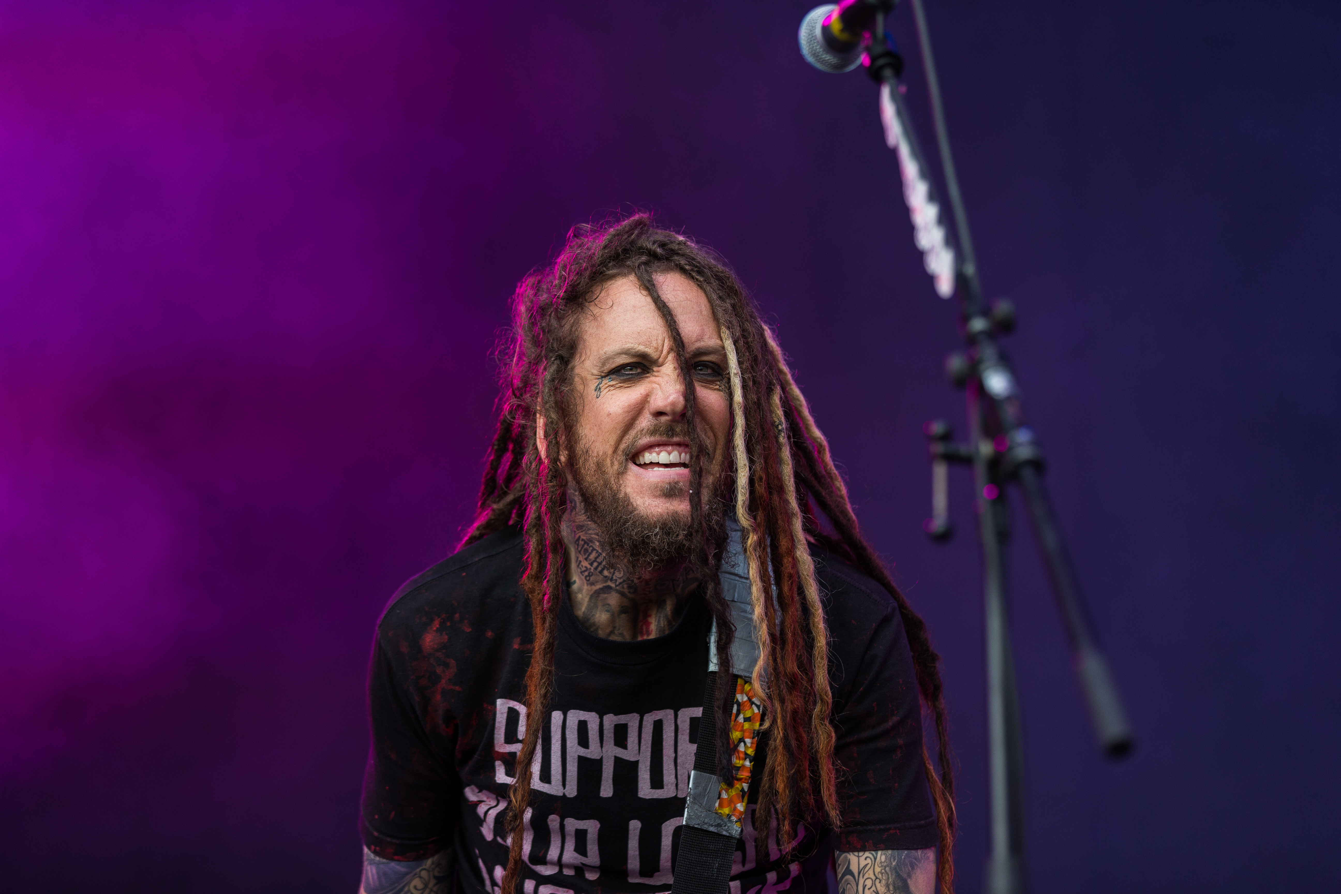 Rock'n'Heim Rock Festival Hockenheim August 2014